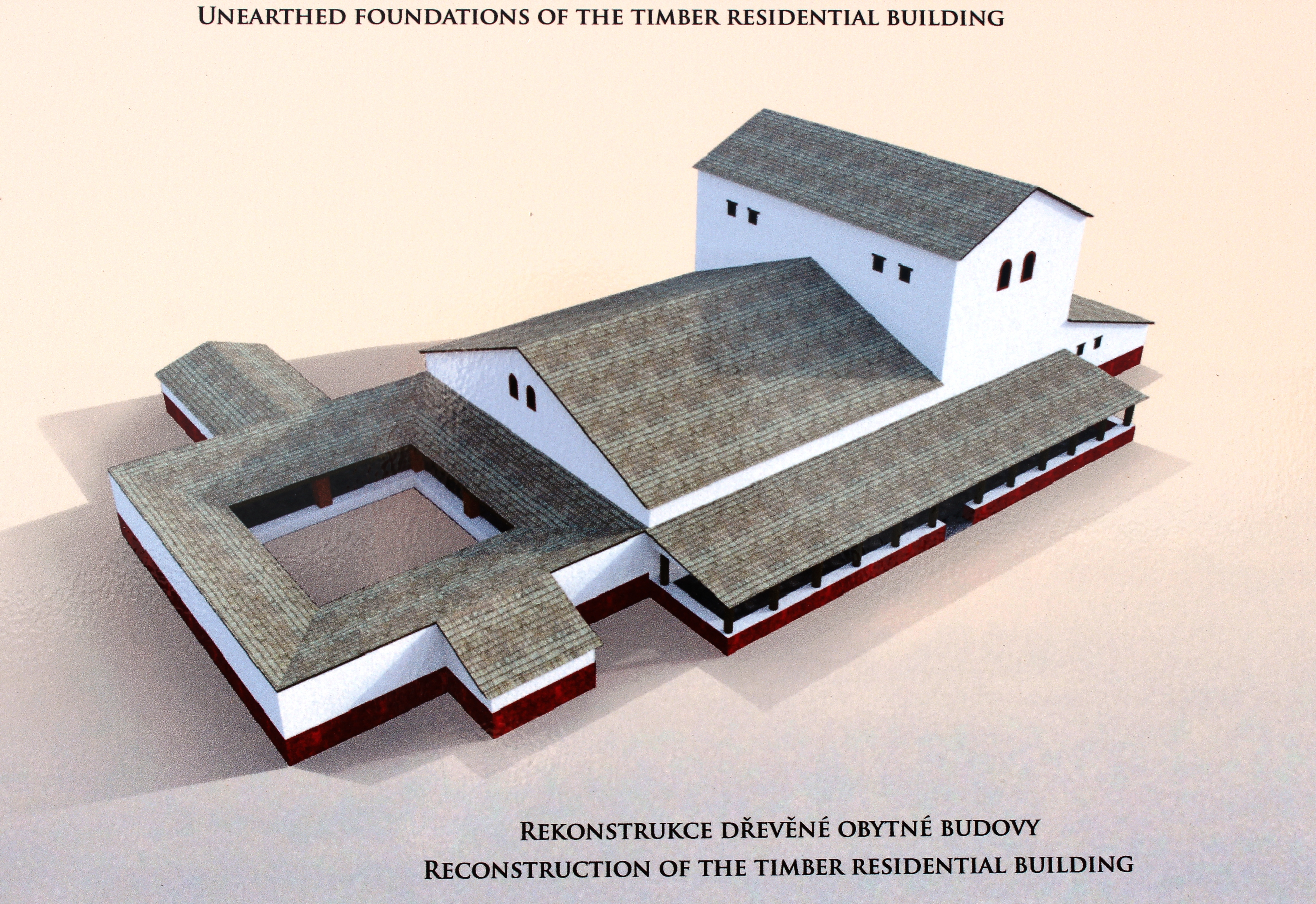 Mušov - Roman fortress - Reconstruction of timbre house (175-180 AC) discovered by Czech academy of sciences team. Info board detail